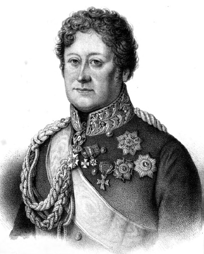 Konrad Rudolf Freiherr von Schäffer - badischer Kriegsminister 1814-1833